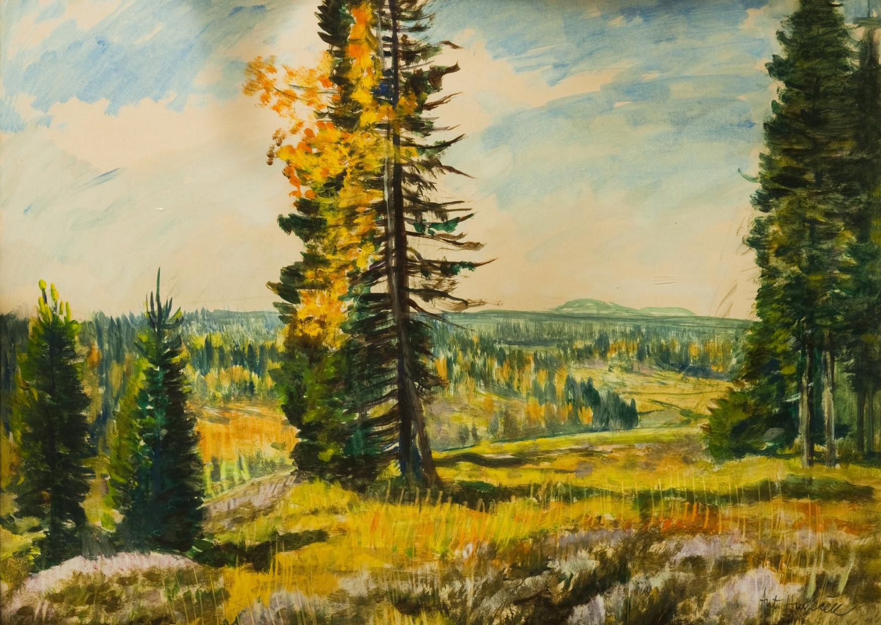 Herbstlandschaft, rechts unten mit Bleistift signiert: Ant. Hudeček, Tempera auf Papier, 42 x 58 cm